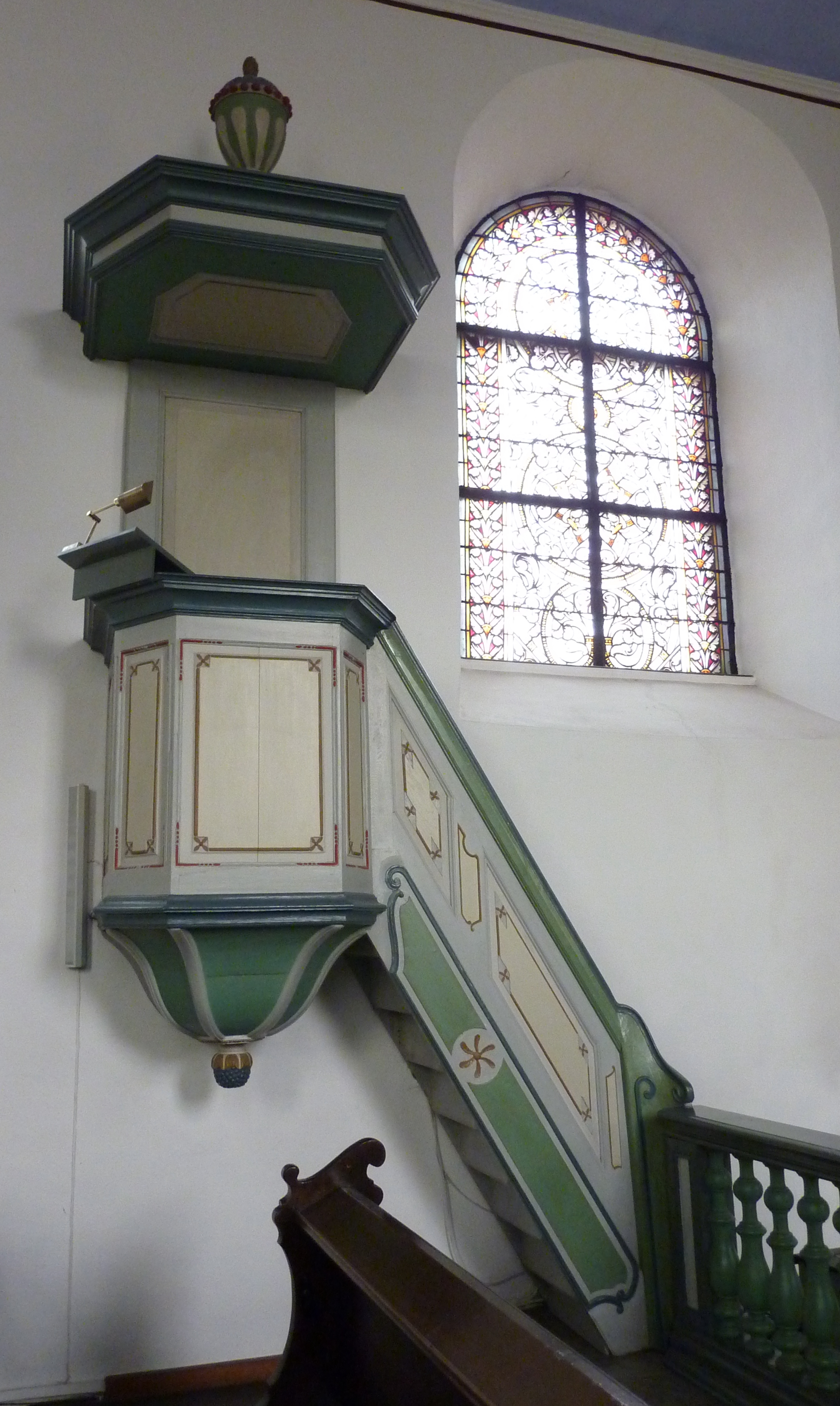 alte Kirche St. Gereon in Berkum, Kanzel